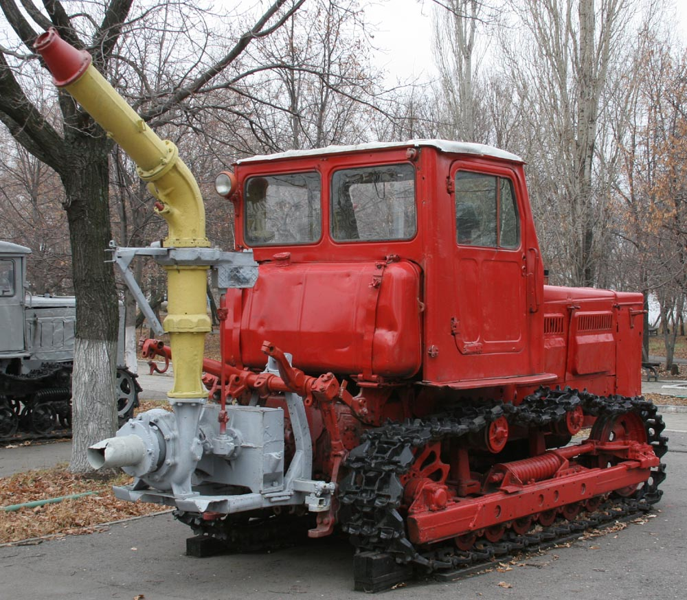 Трактор Т-4А в Саратове на Соколовой горе